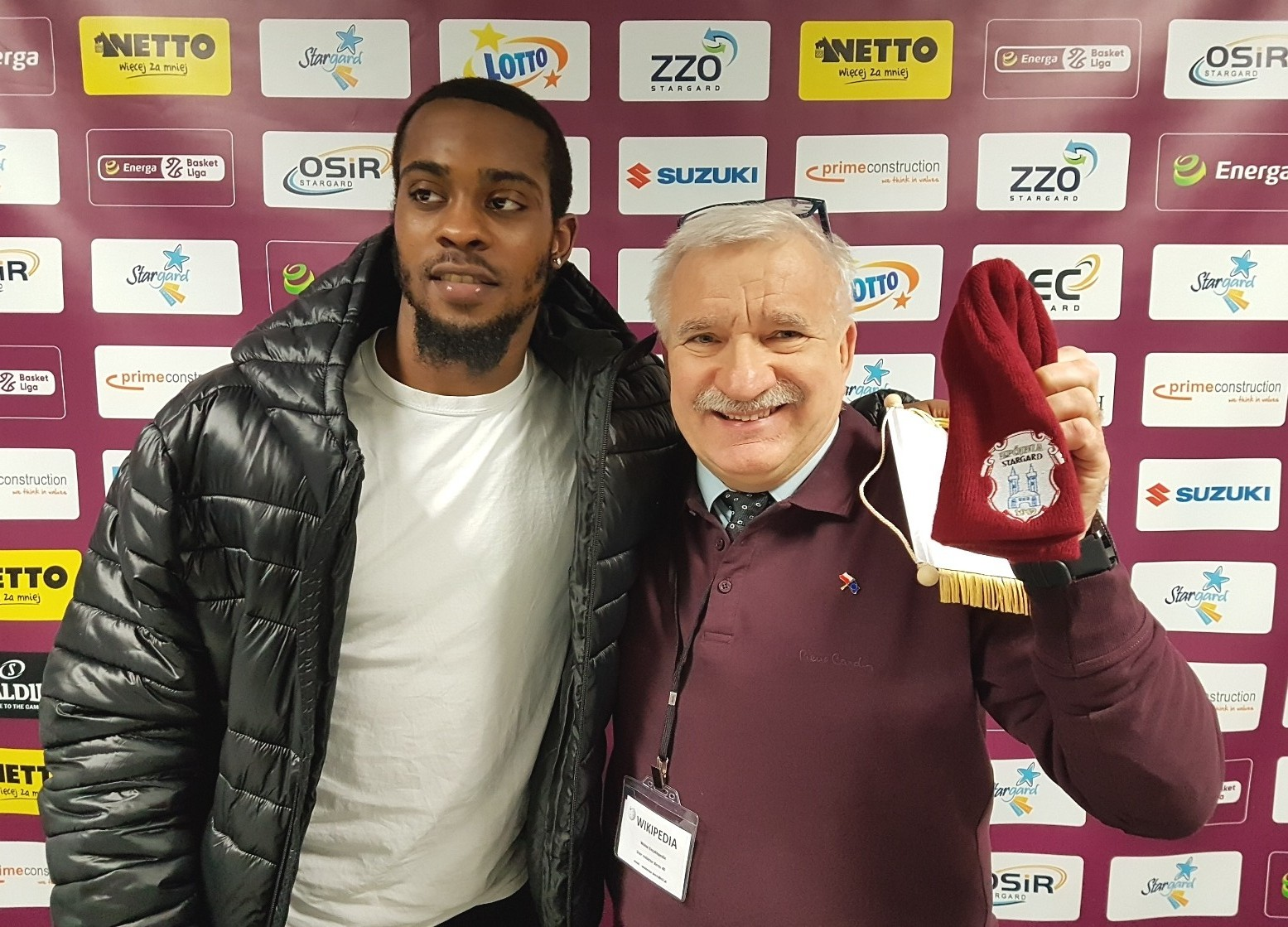 Stargard, 18.01.2019. Anthony Hickey i Wikipedia